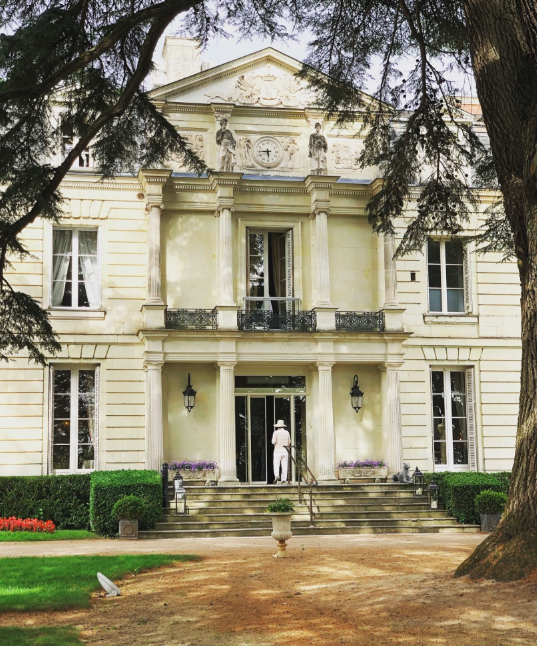 Entrée principale